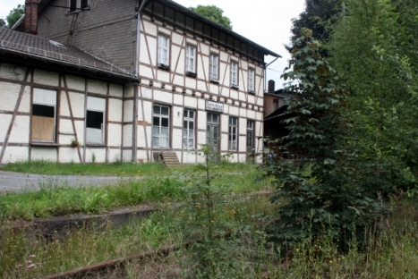 historical Train Station Derschlag / stillgelegter Bahnhof Derschlag